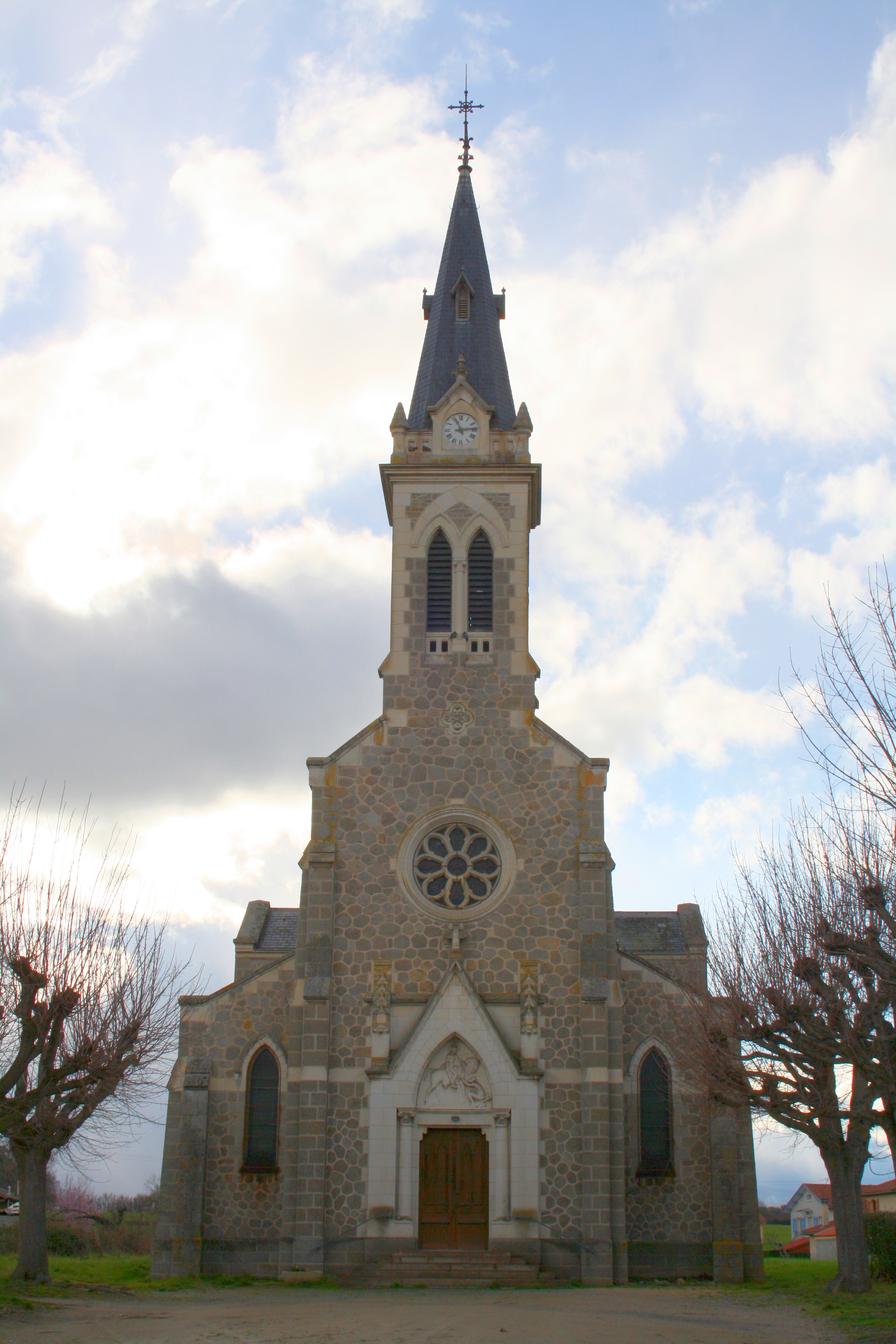 Eglise Saint-Martin de Magneux-Haute-Rive